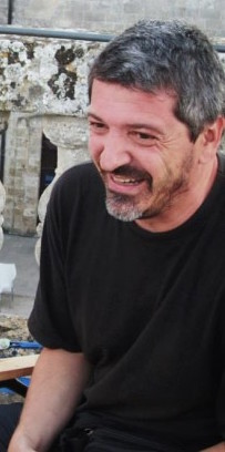 Michele Mellara